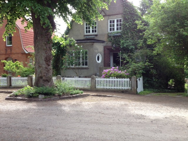 Das Wohnhaus für Max Zühl, 1925. Originelle Kombination aus Reformarchitektur und Expressionismus.(Baustilbeschreibung von Hans-Günther Andresen, Kiel, 2017)